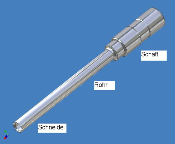 Paperdrillbit